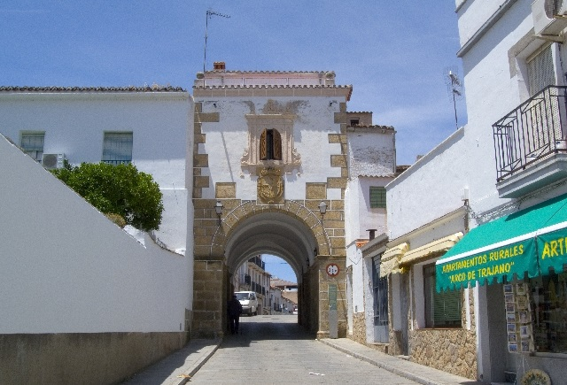 Arco de la Concepción, Alcántara, provincia de Cáceres, España